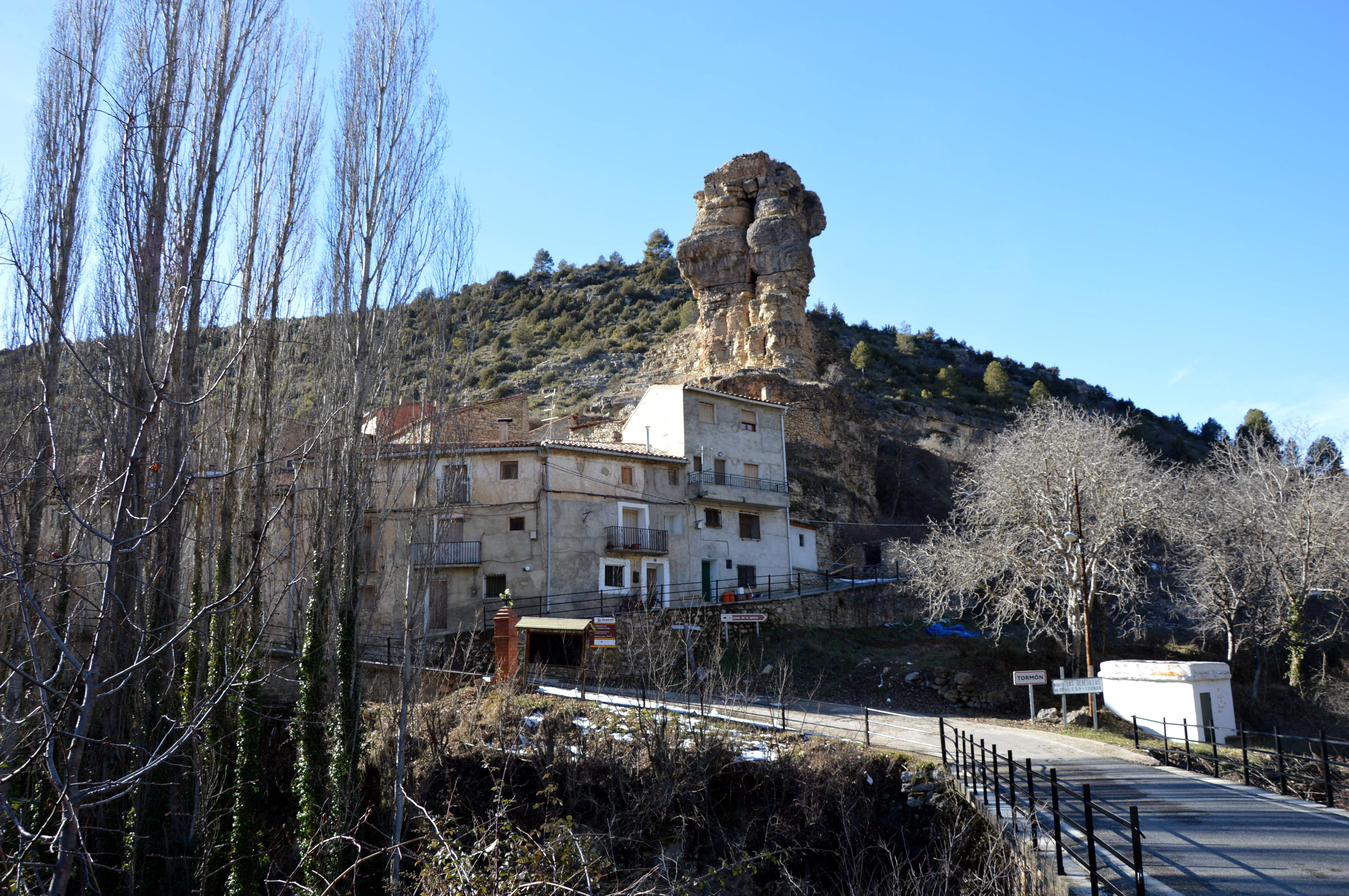 Entrada septentrional a Tormón (Teruel), con detalle del puente sobre el río Ebrón y tormo del Castillo, desde la fuente del Lavadero (2017).